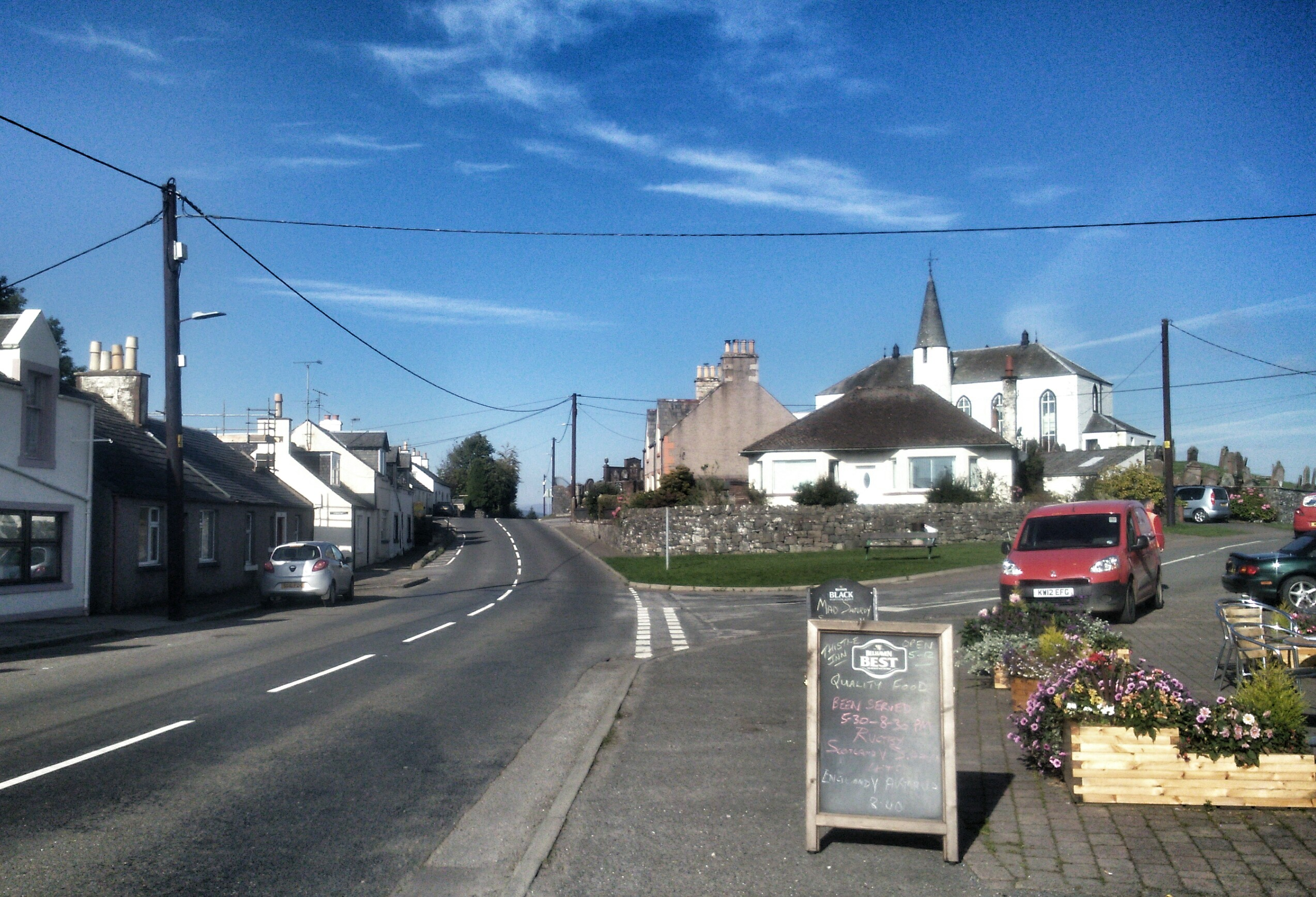 Gàidhlig: Sealladh air Cros Mhìcheil